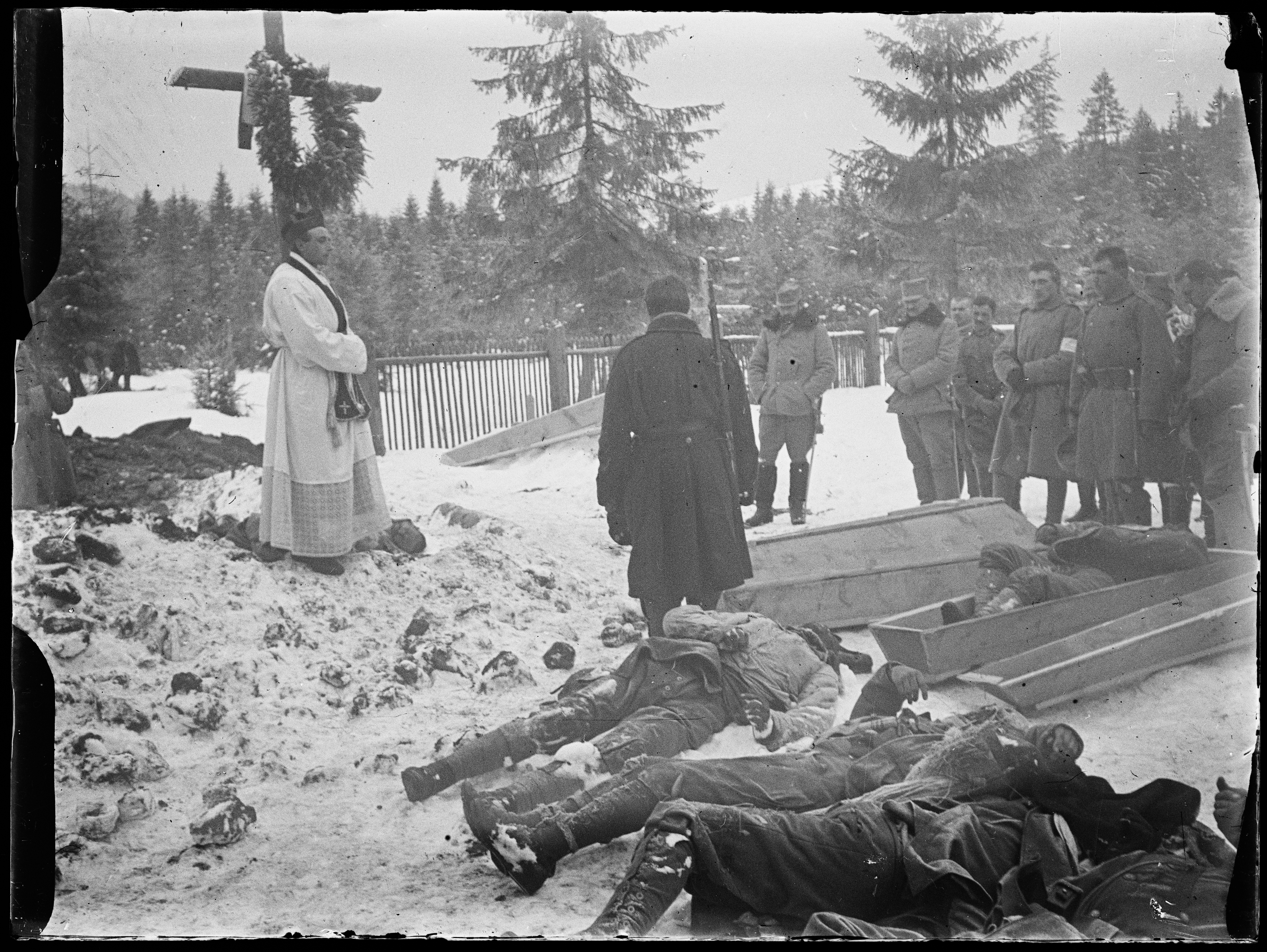 Na zdjęciu widzimy pogrzeb legionistów II Brygady Legionów Polskich, z grupy operacyjnej płk. Józefa Hallera, poległych w bitwie nocnej w Rafajłowej (z 23 na 24 stycznia 1915 roku). Autor tego zdjęcia służył wtedy w sztabie płk. Hallera jako reporter wojenny i robił zdjęcia na pobojowisku, a także później w czasie pogrzebu poległych. Swoje wspomnienia z tego wydarzenia opublikował w artykule Krwawa niedziela w Karpatach, "Panteon Polski" 1924, nr 3, s. 2-3.